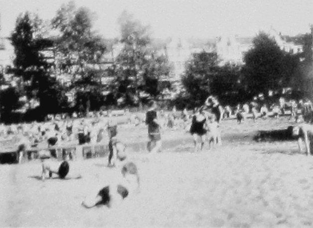 Die Geschichtstafel am Schleidenpark in Barmbek-Süd beschäftigt sich mit dem Park, der für das neu gebaute Arbeiterwohnquartier in den 1900er Jahren angelegt worden ist.